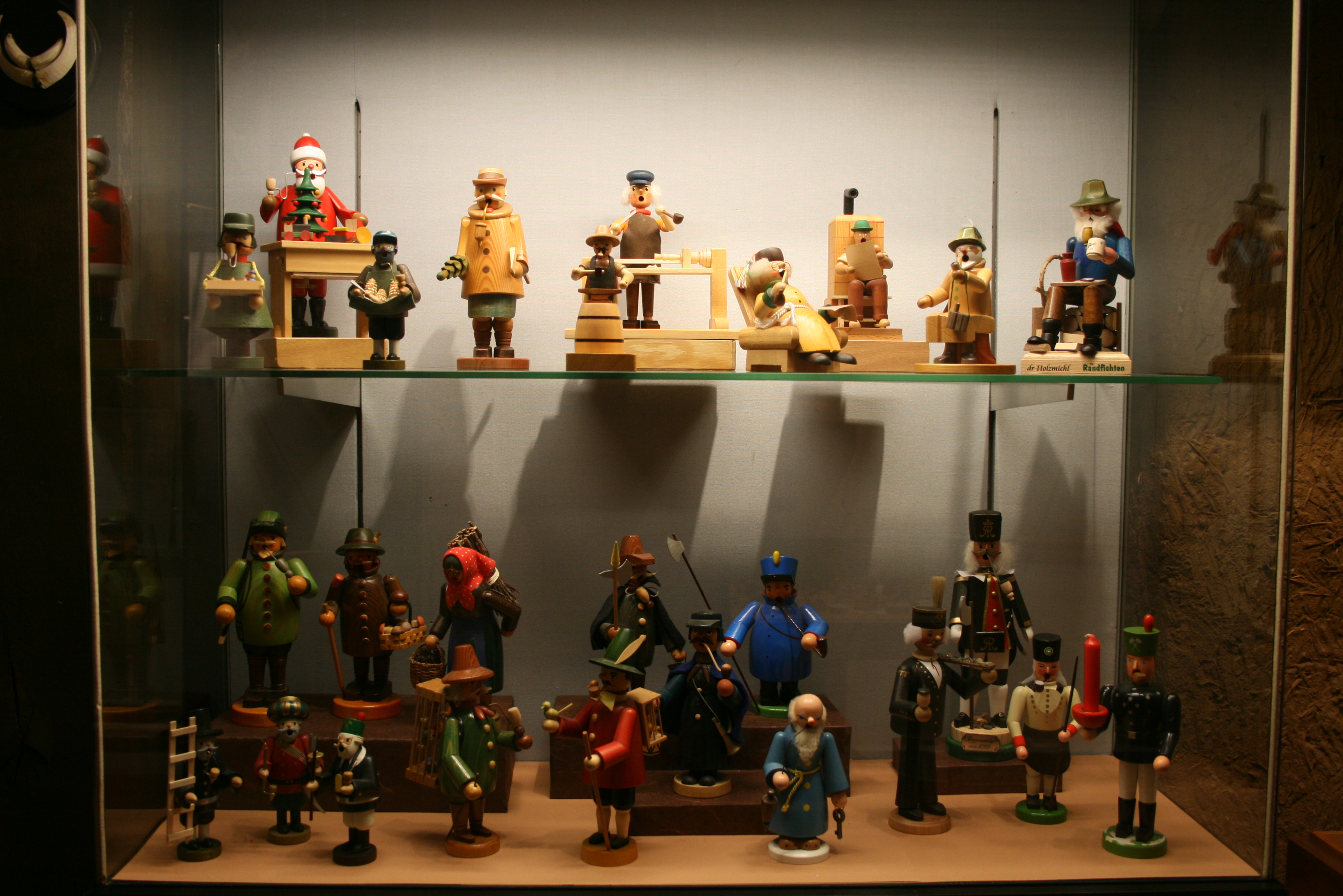 Seelze: Heimatmuseum Seelze im Ortsteil Letter, Ausstellung im Jahr 2012/3 zum Thema „Weihnachtsland Erzgebirge“.